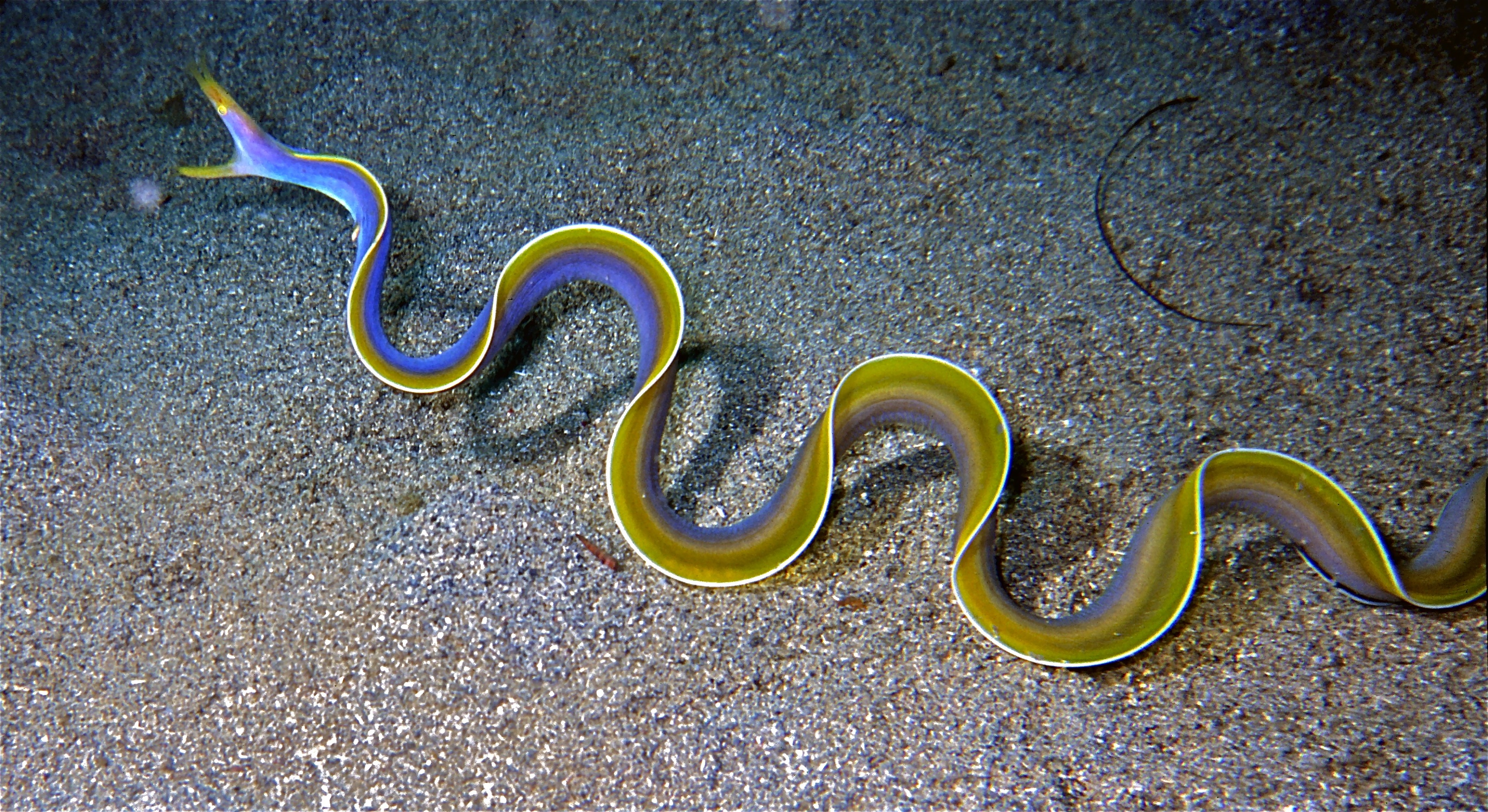 Bunaken, Sulawesi, INDONESIA